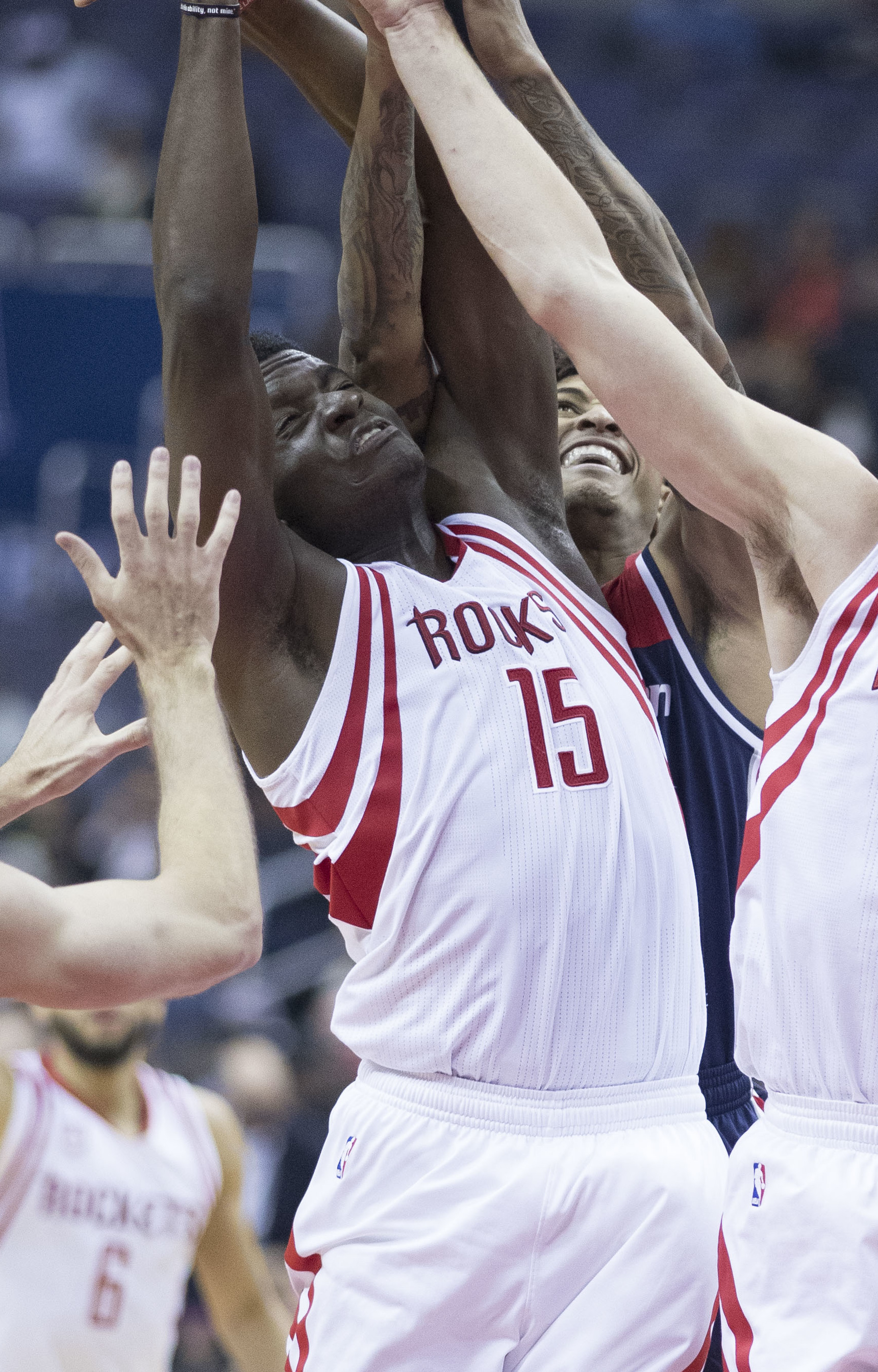 Clint Capela and Sam Dekker